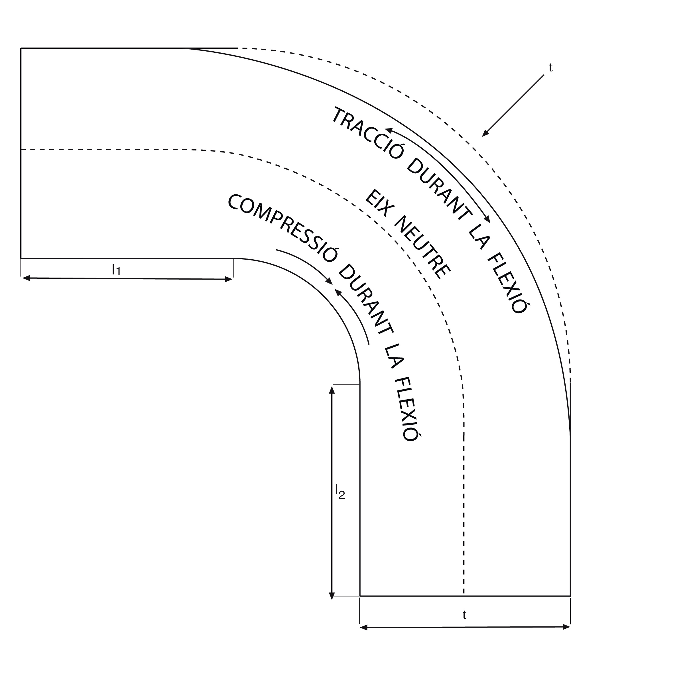 Analisis recuperacion elastica